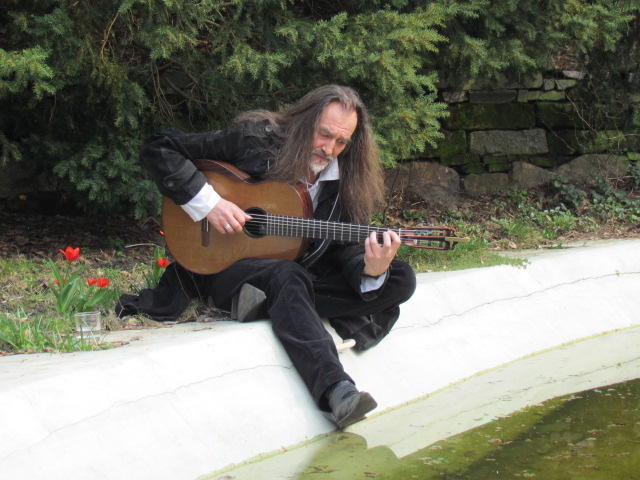 Mirosław Czyżykiewicz Fot. Anna Czyżykiewicz